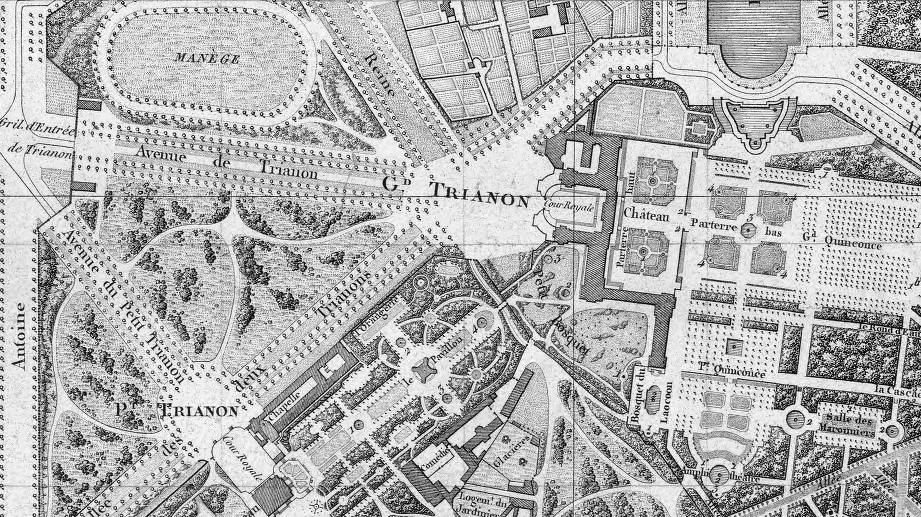 Plan de la ville, du château et du parc de Versailles avec les palais et jardins du grand et du petit Trianon